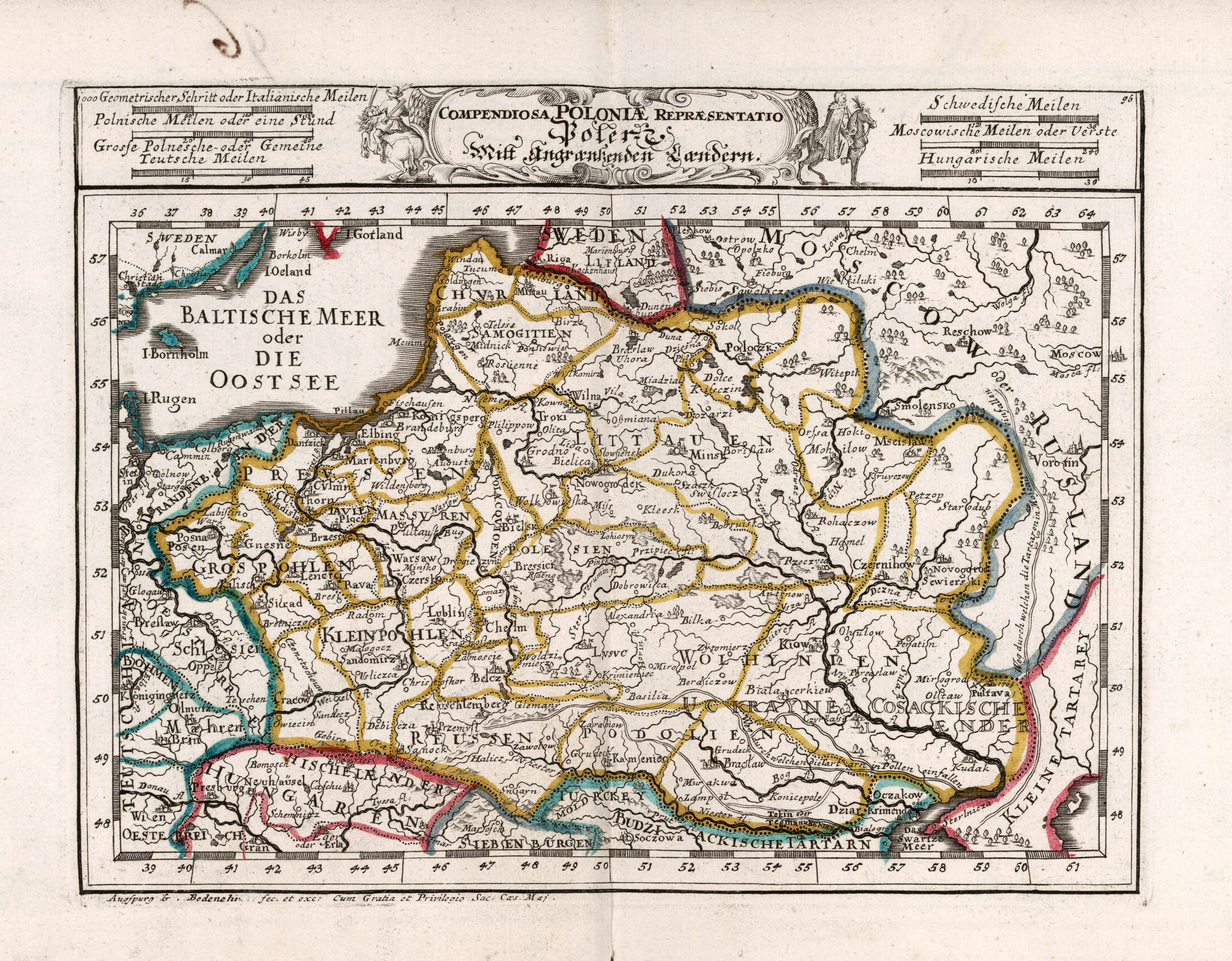 Мапа Польщі